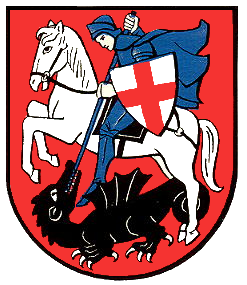 Wappen: Kaltbrunn siehe auch: Copyright Wappen St. Gallen